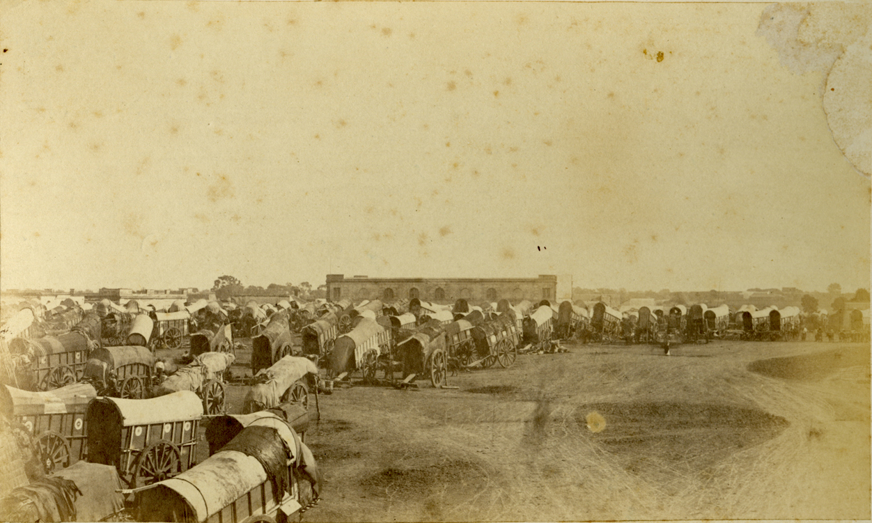 Esta conocida imagen muestra el antiguo Mercado de Constitución - actual estación ferroviaria - amplio espacio donde estacionaban las tropas de carretas que hacían el tráfico de productos y mercaderías entre Buenos Aires y el interior del país.